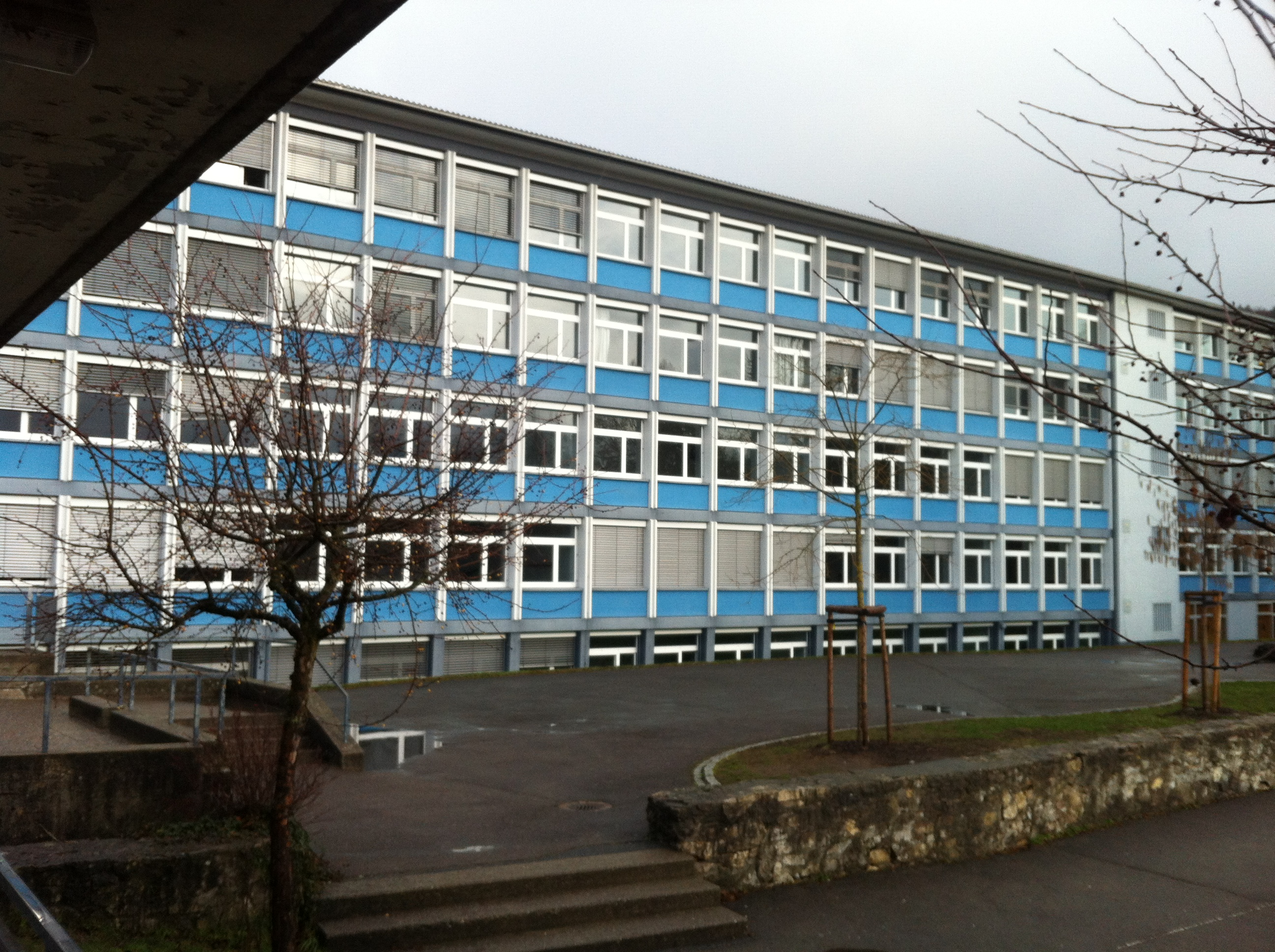 Hochrhein-Gymnasium Waldshut in Stadtteil Waldshut von Waldshut-Tiengen, im Landkreis Waldshut in Baden-Württemberg. Hauptgebäude, Südseite.